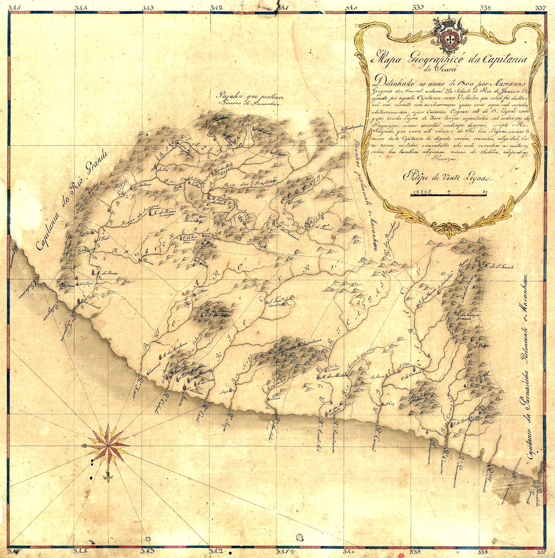 Mapa Geográphico da Capitania do Ceará.